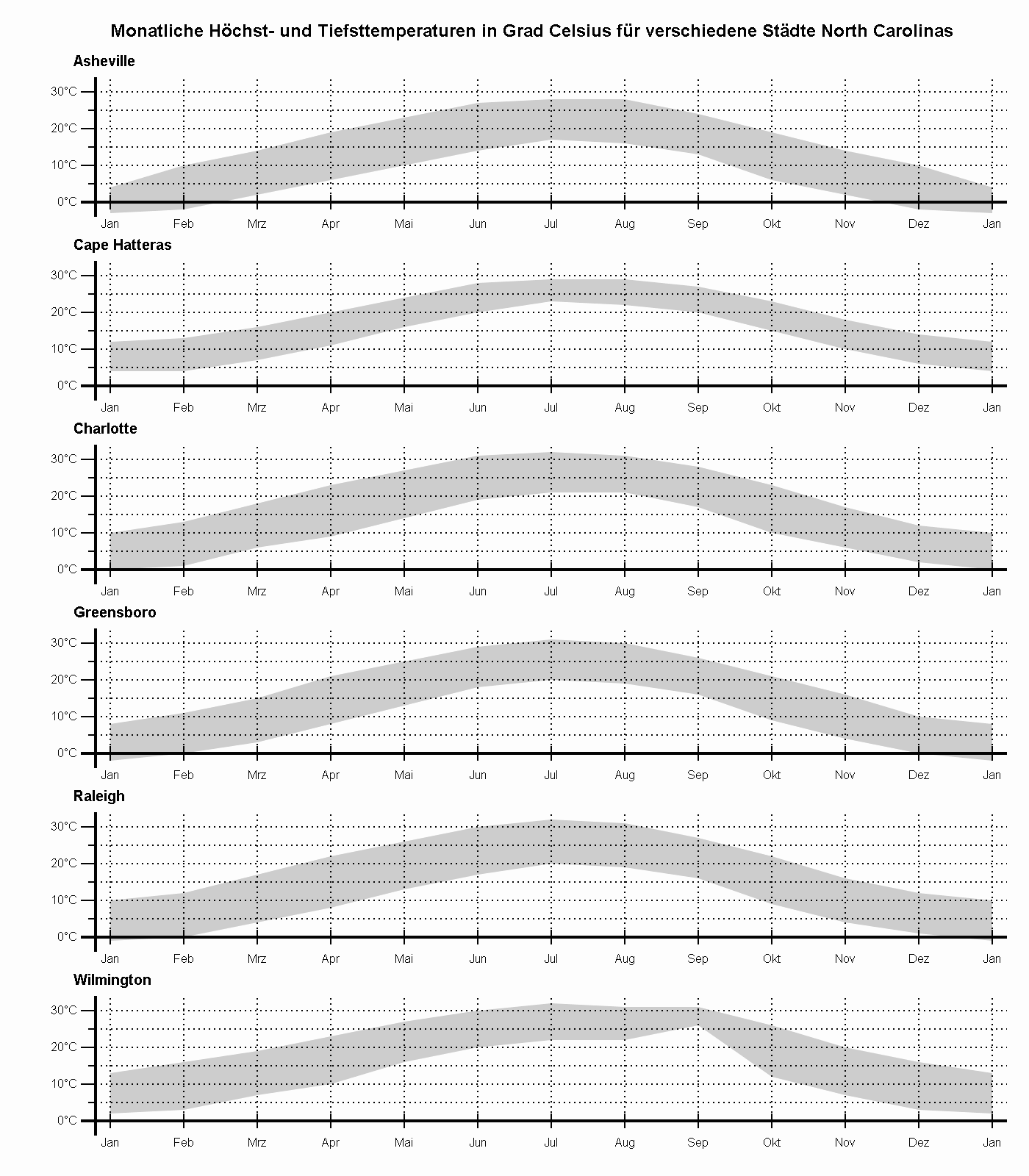 Maximale und minimale Temperaturen in North Carolina